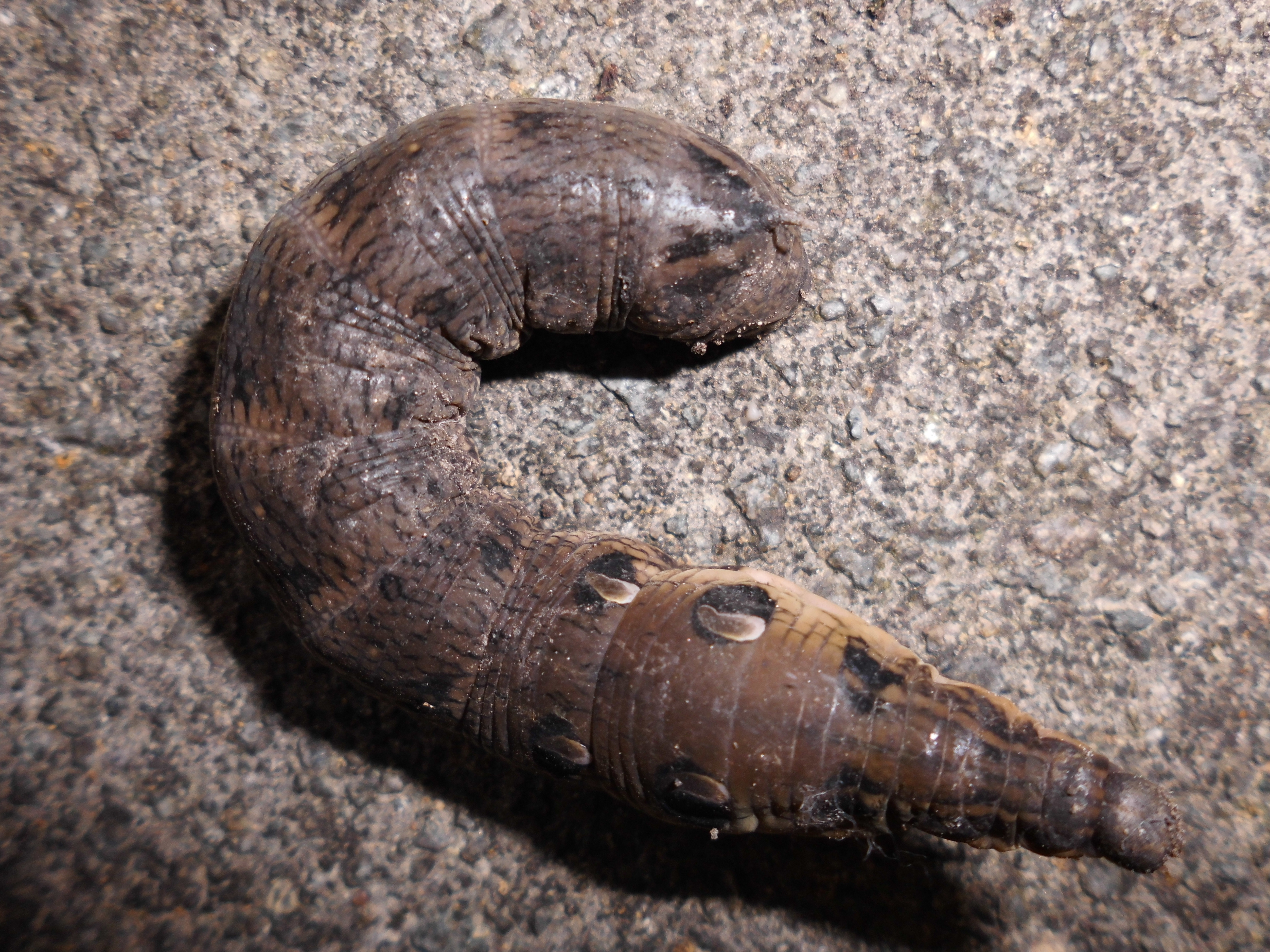 Deilephila elpenor Groot avondrood rups